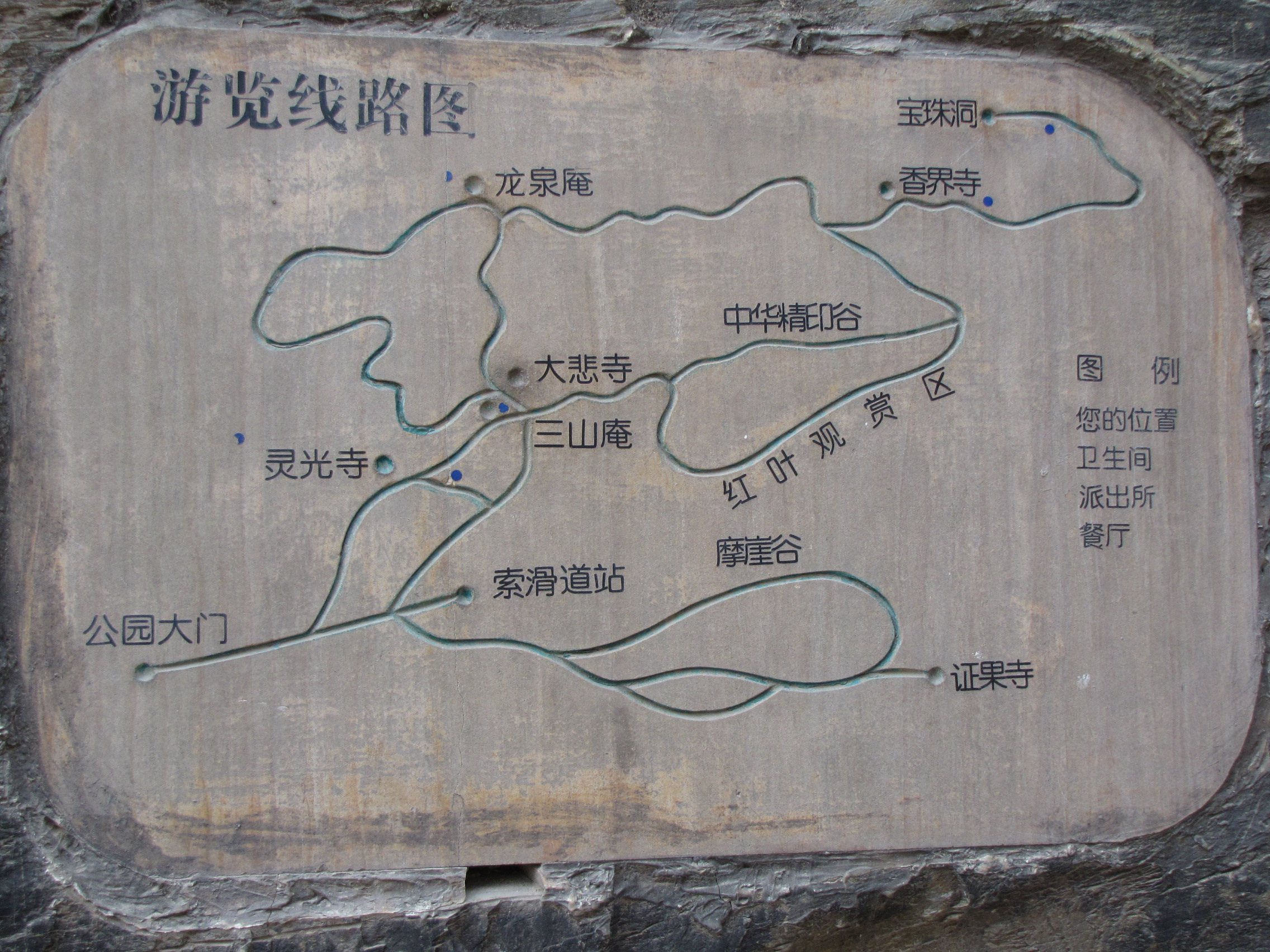 Chine, Beijing, Carte des sentiers du site de Badachu, affichée le long d'un sentier.